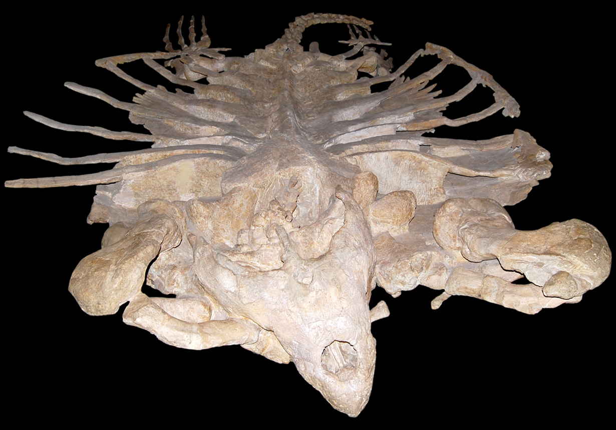 Naturhistorisches Museum Wien